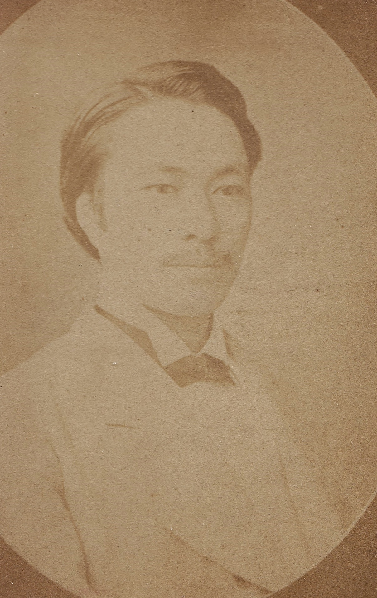 吉田清成の鶏卵紙